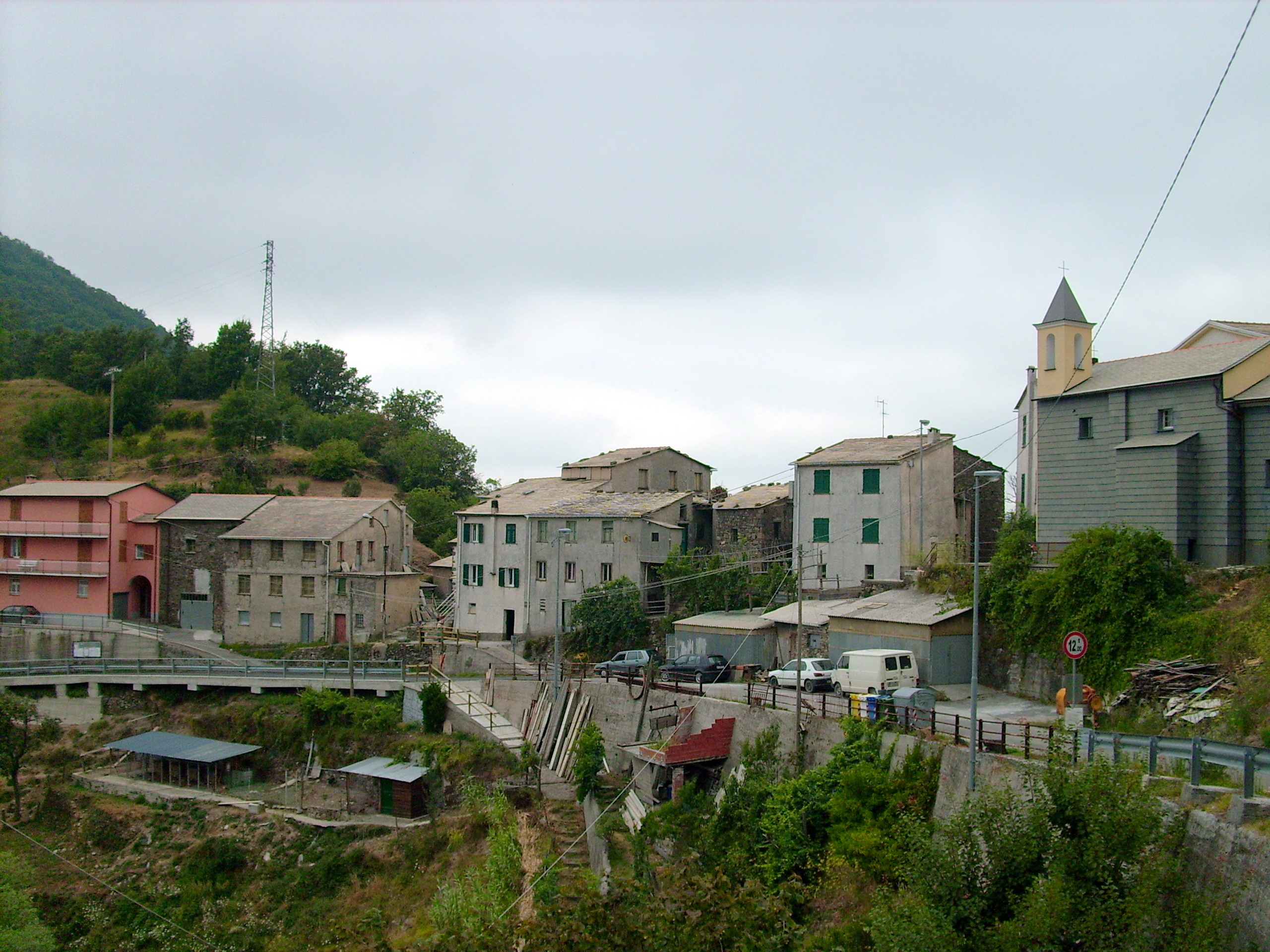 Panorama di Croce d'Orero, Liguria, Italia